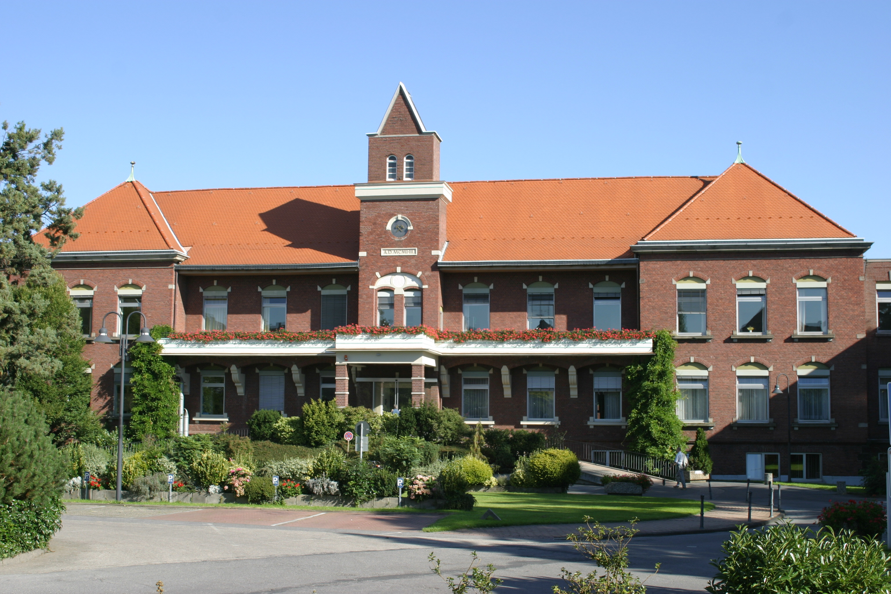 Medizinisches Zentrum Kreis Aachen, Betriebsteil Bardenberg, Haupteingang